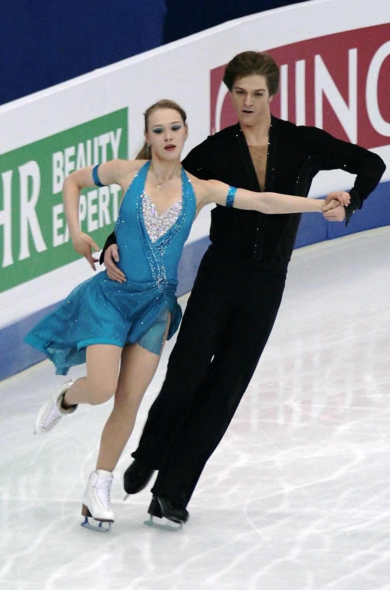 Шивон Хикин-Кенеди и Дмитрий Дунь (Украина) на чемпионате мира по фигурному катанию 2012